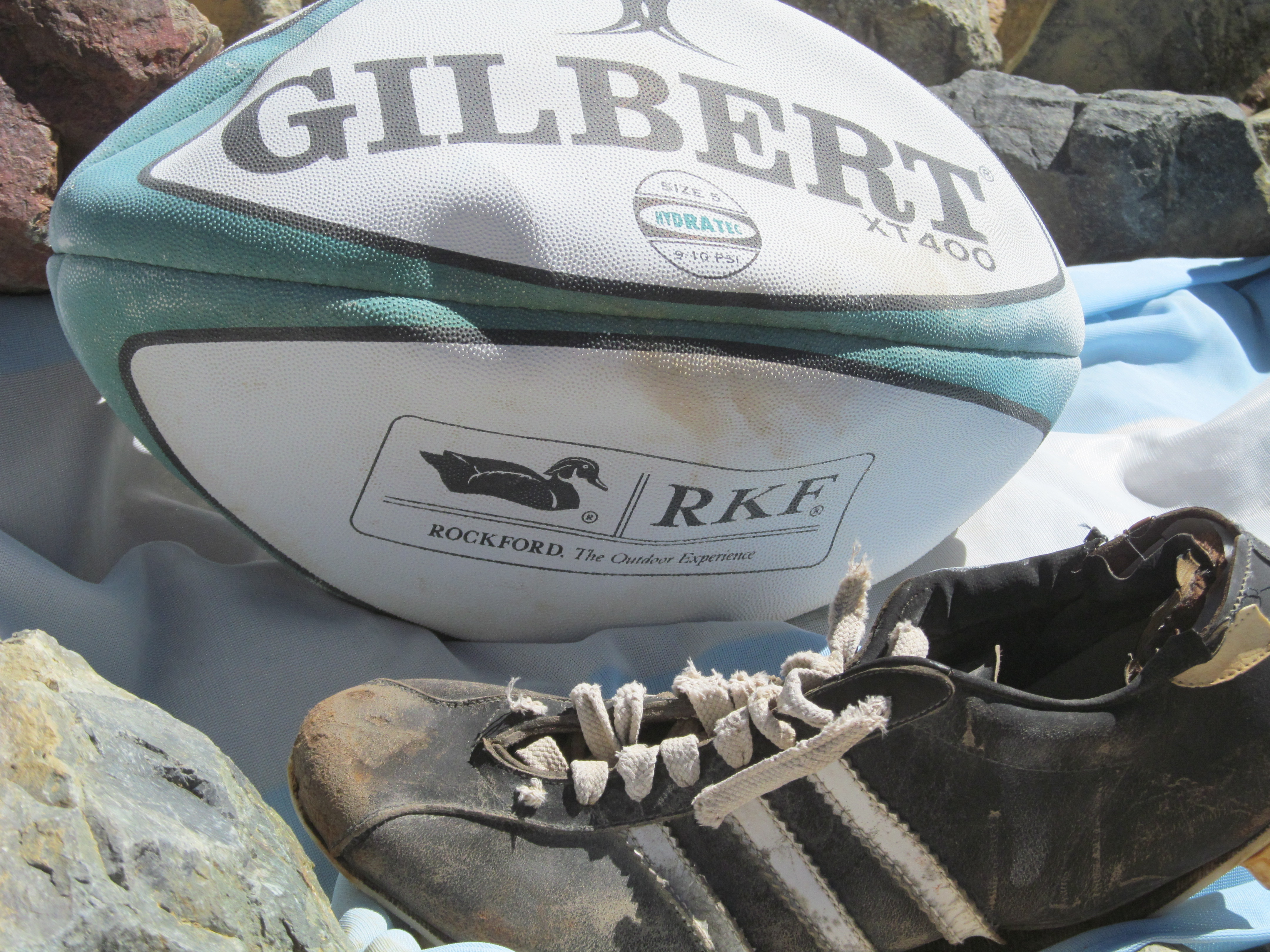 Botin y pelota en el lugar del accidente.